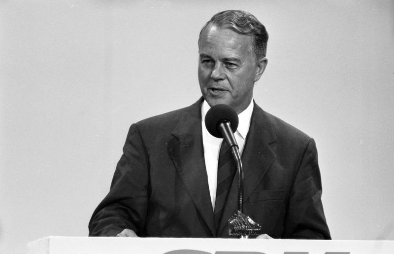 11.-13.9.1989 37. Bundesparteitag der CDU in der Bremer Stadthalle.